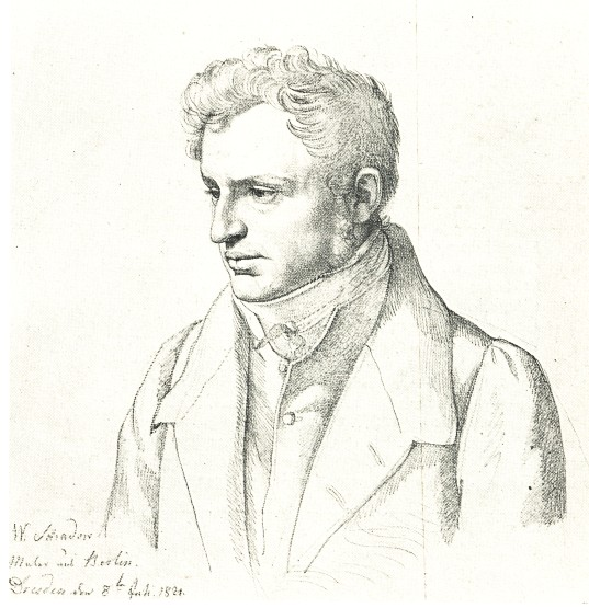 Porträt des Malers Friedrich Wilhelm von Schadow